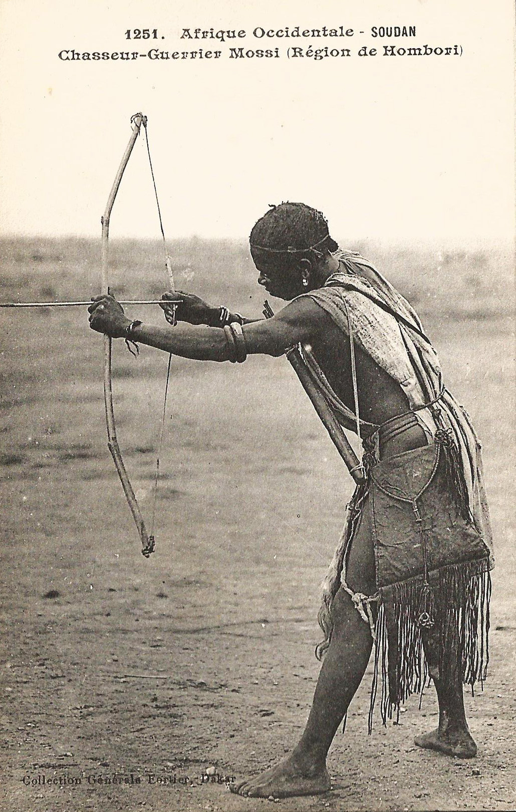 François-Edmond Fortier, Chasseur-guerrier Mossi (Région de Hombori). Afrique Occidentale - Soudan.